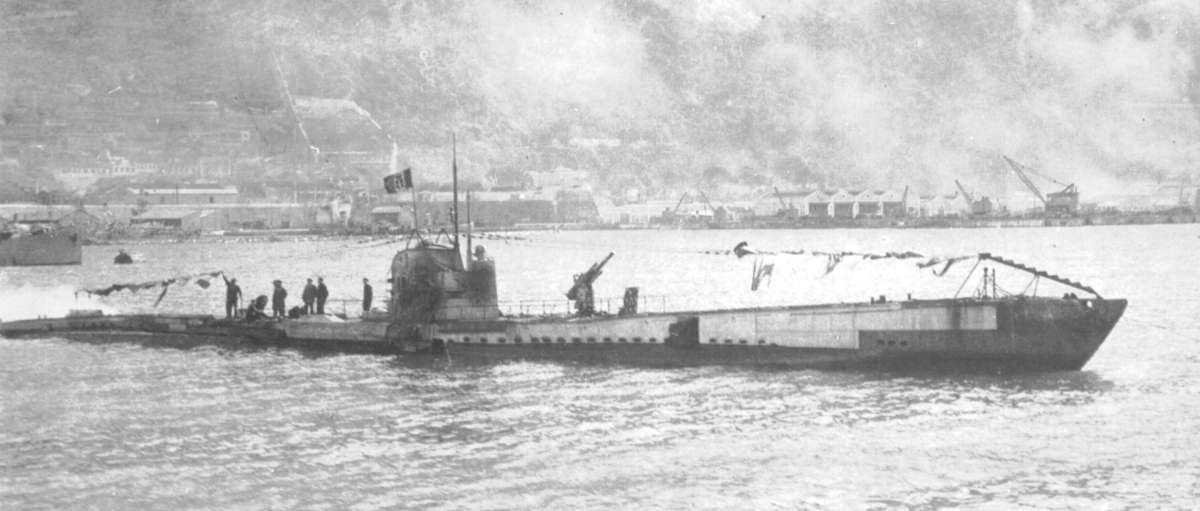 SM UC 93 in La Spezia